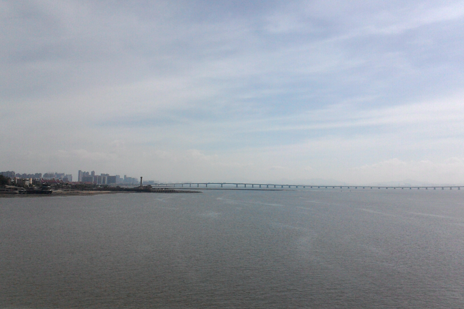 由廈門大橋望向集美大橋,福建省廈門市集美區集美街道潯江社區